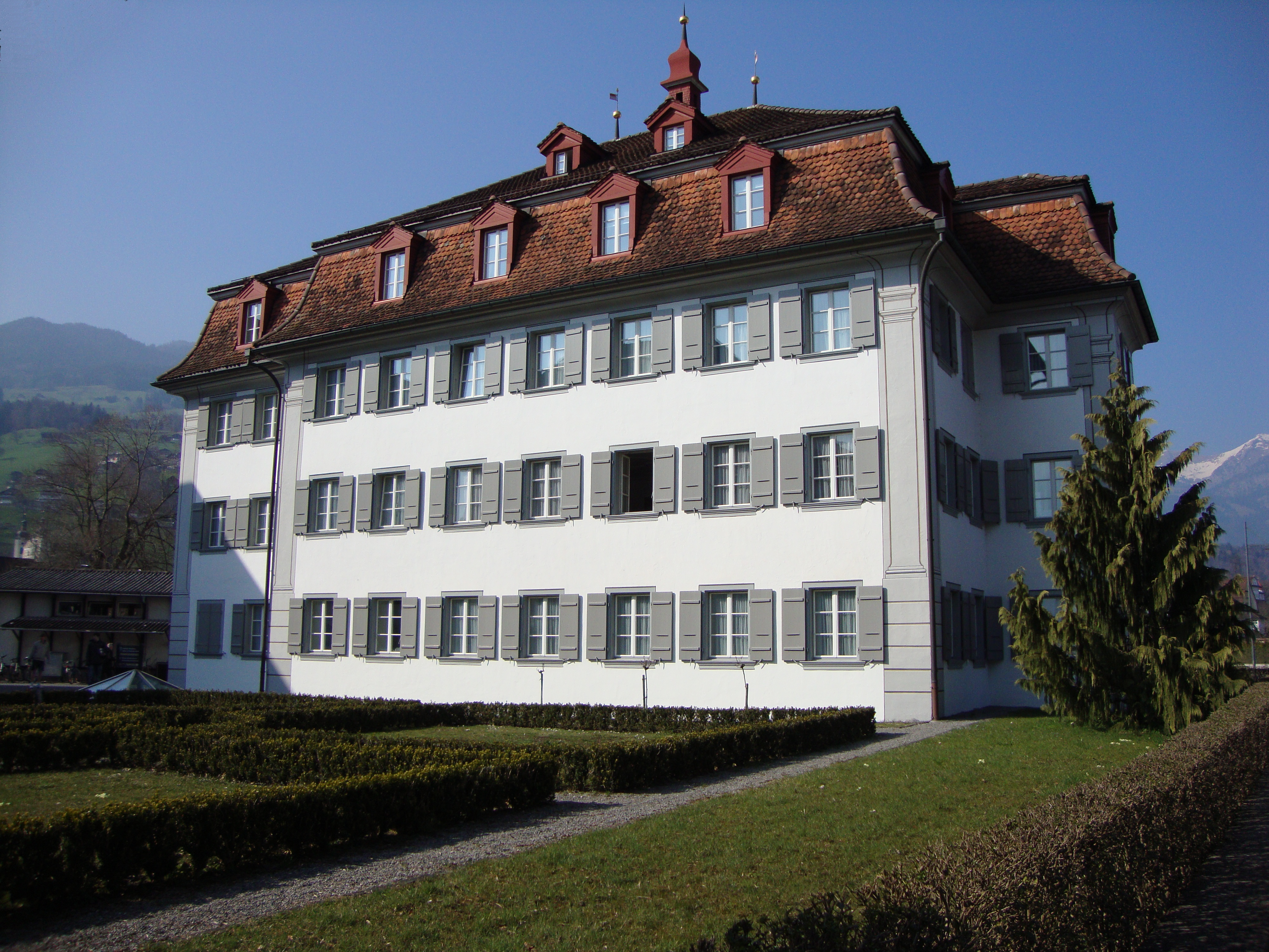 altes Kollegi